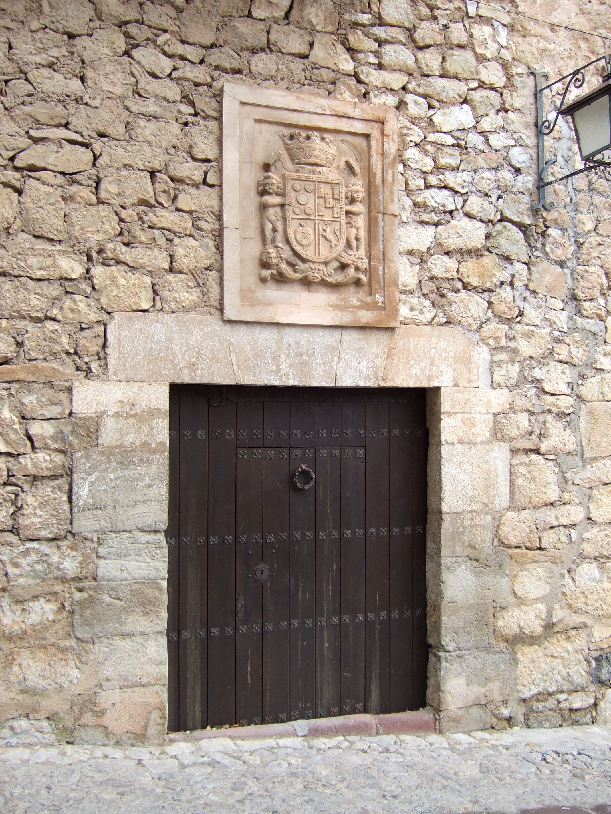 Albarracín - Casa de los Dolz de Espejo s. XV y XVI - Portada